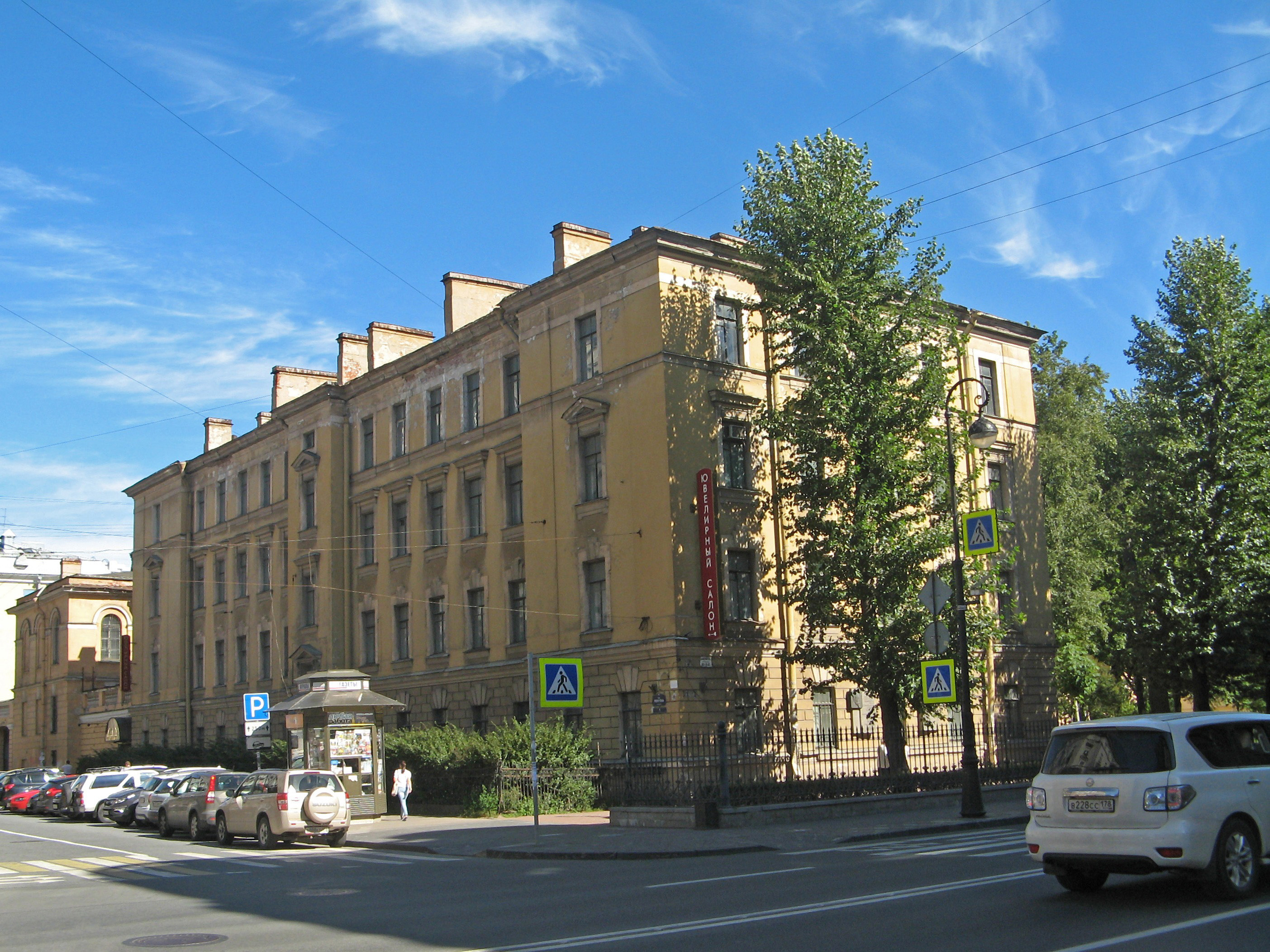 Лицей Императорский Александровский. Корпус для воспитателей: Каменноостровский проспект, 21-23, улица Большая Монетная, 12-14, Улица Рентгена, 1, Петроградский район, Санкт-Петербург